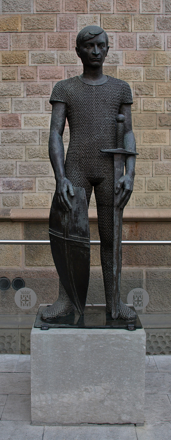 Sant Jordi (Joan Rebull, 1977)